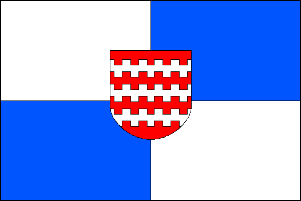 vlajka, Tovačov, okres Přerov